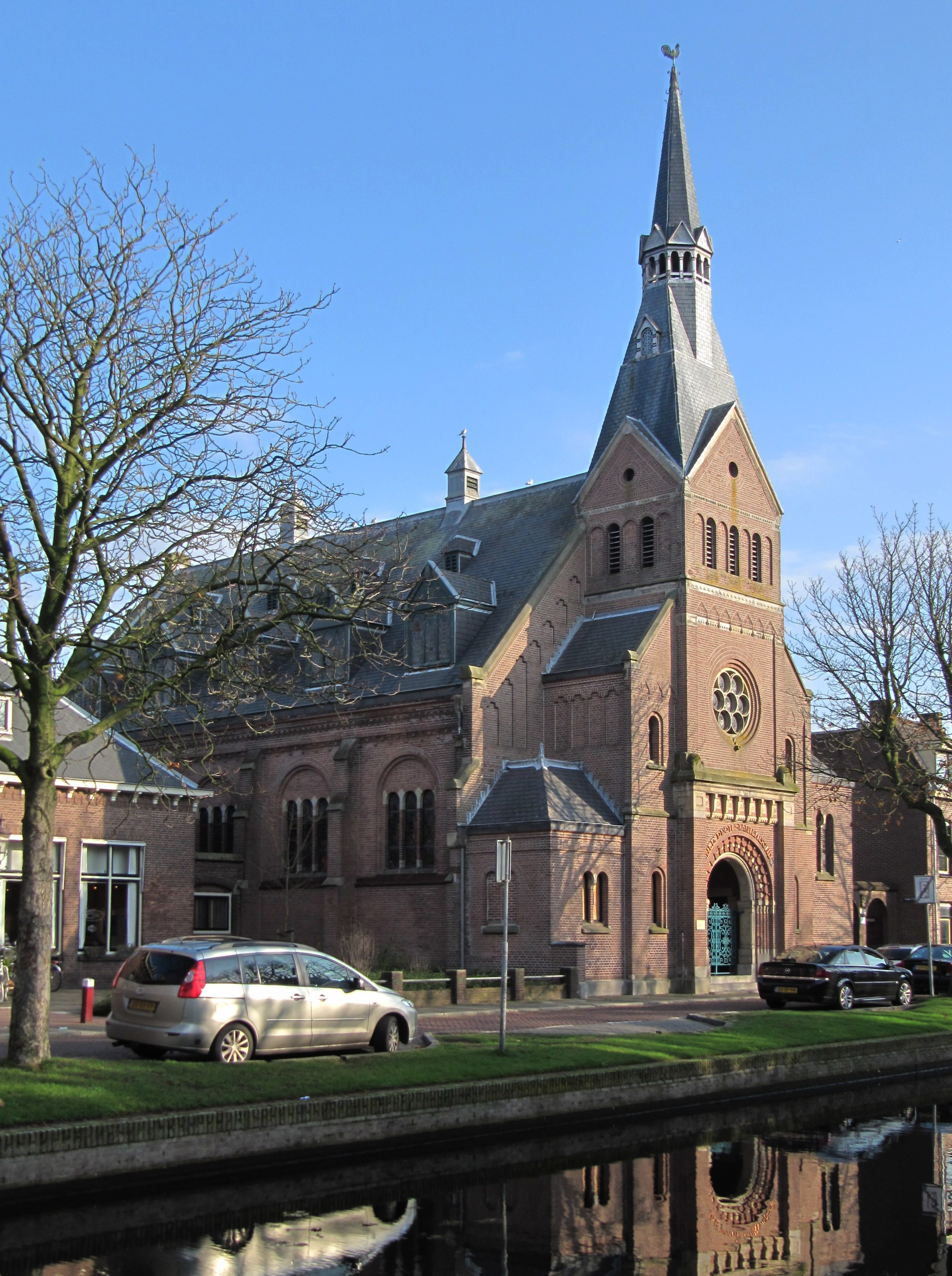 RM512906 Weesp - Oudegracht 69.jpg